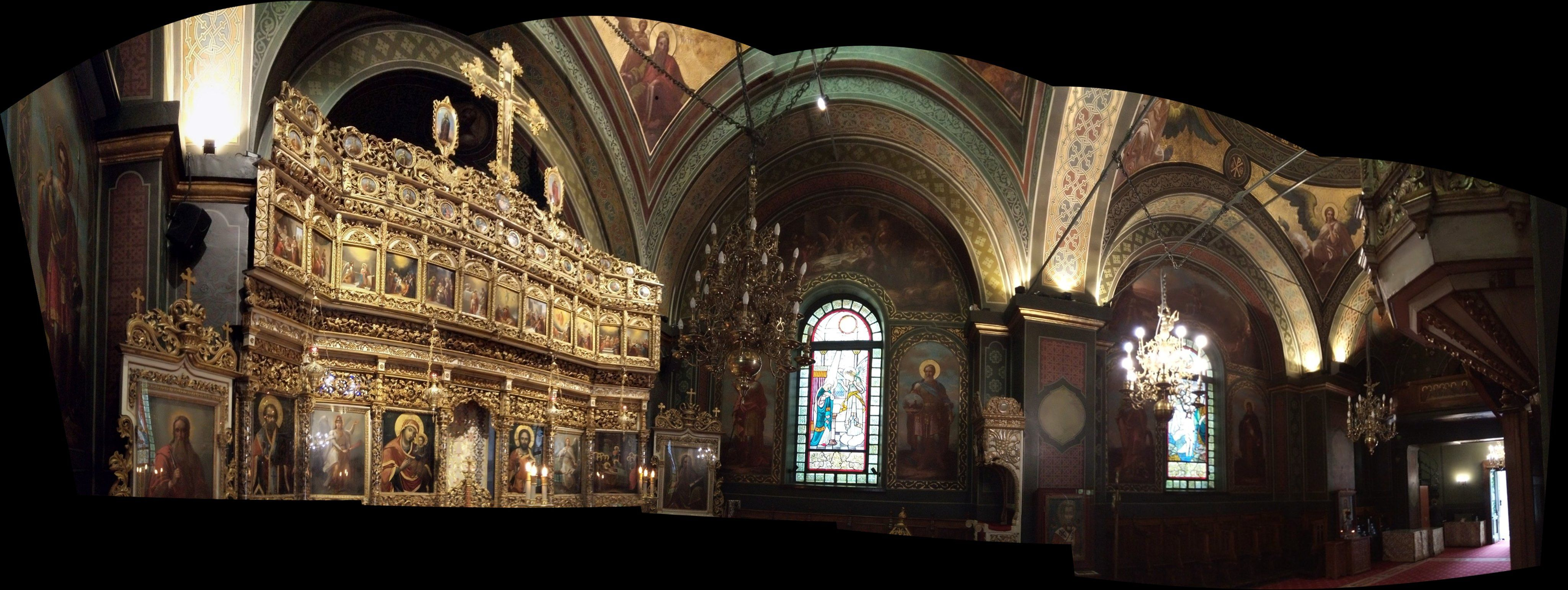 Panoramic din interiorul Bisericii Albe din București